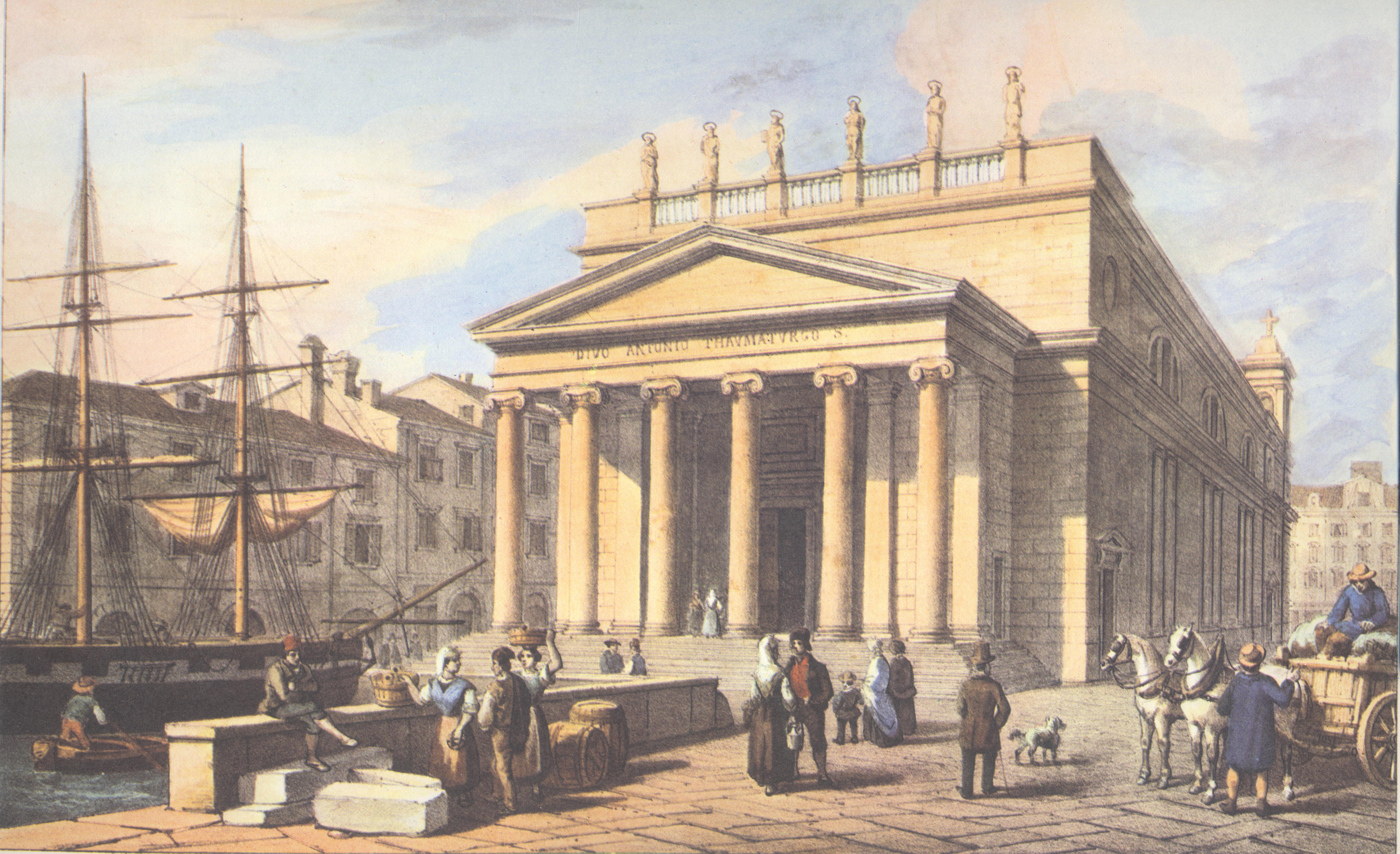 Trieste - Canal Grande - Un disegno di Marco Moro del 1854